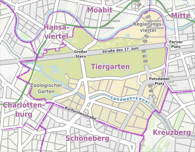 Übersichtskarte der Straßen und Ortslagen in Berlin-Tiergarten